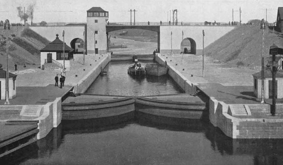 Hammarbyslussen med vatten 1926, i bakgrunden syns Skansbron